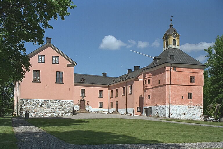 Slottet, Vasatornet till höger. Motiv: Rydboholms slott Nyckelord: Byggnadsminnen Kategori: SlottSlottet, Vasatornet till höger.